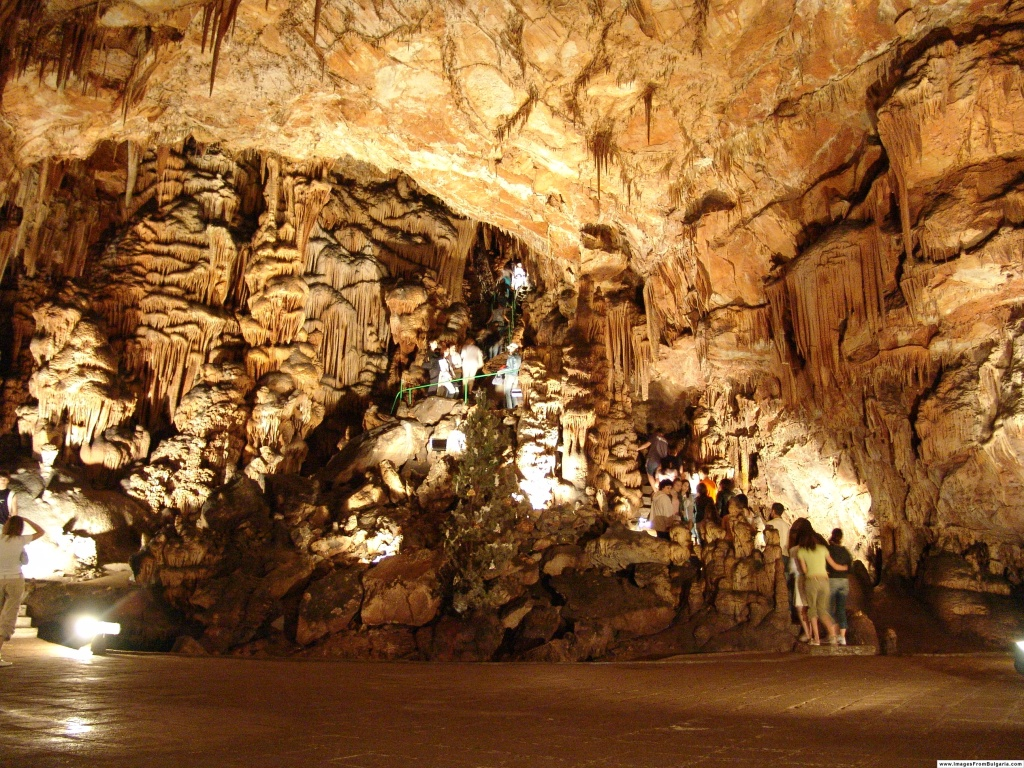 Пещерата Съева дупка, юни 2006